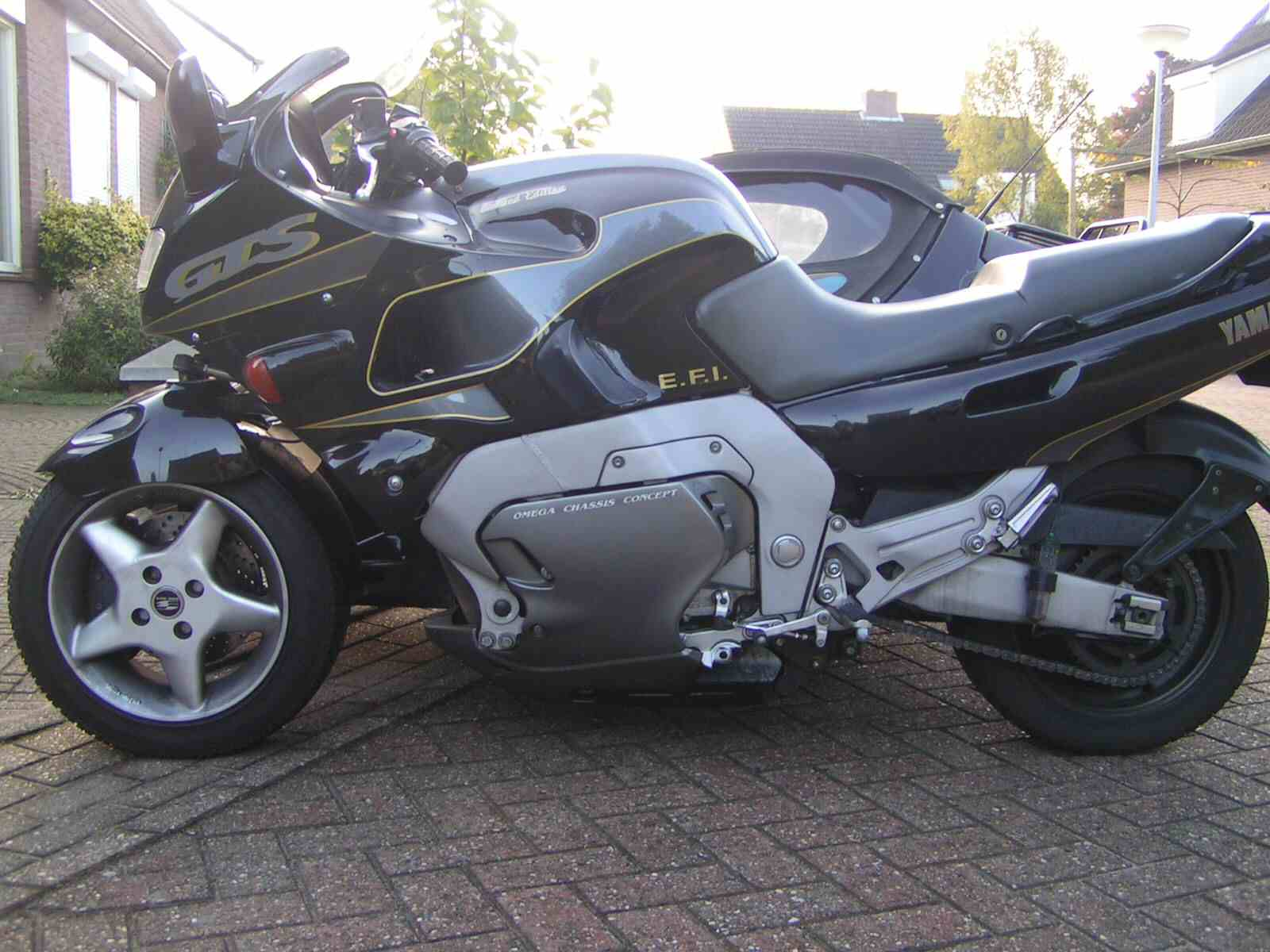 Toestemming van Barry Soeterik